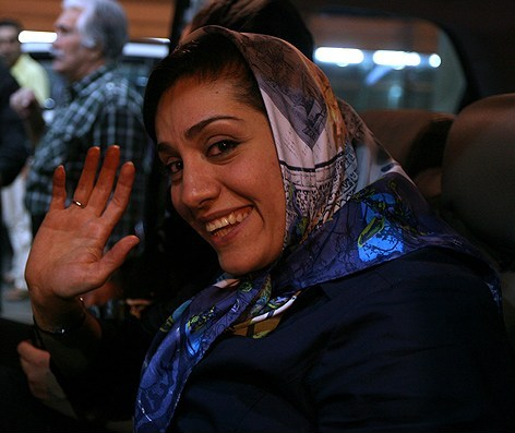 بازگشت شهرزاد میرقلی‌خان به ایران پس از آزادی از زندان در آمریکا